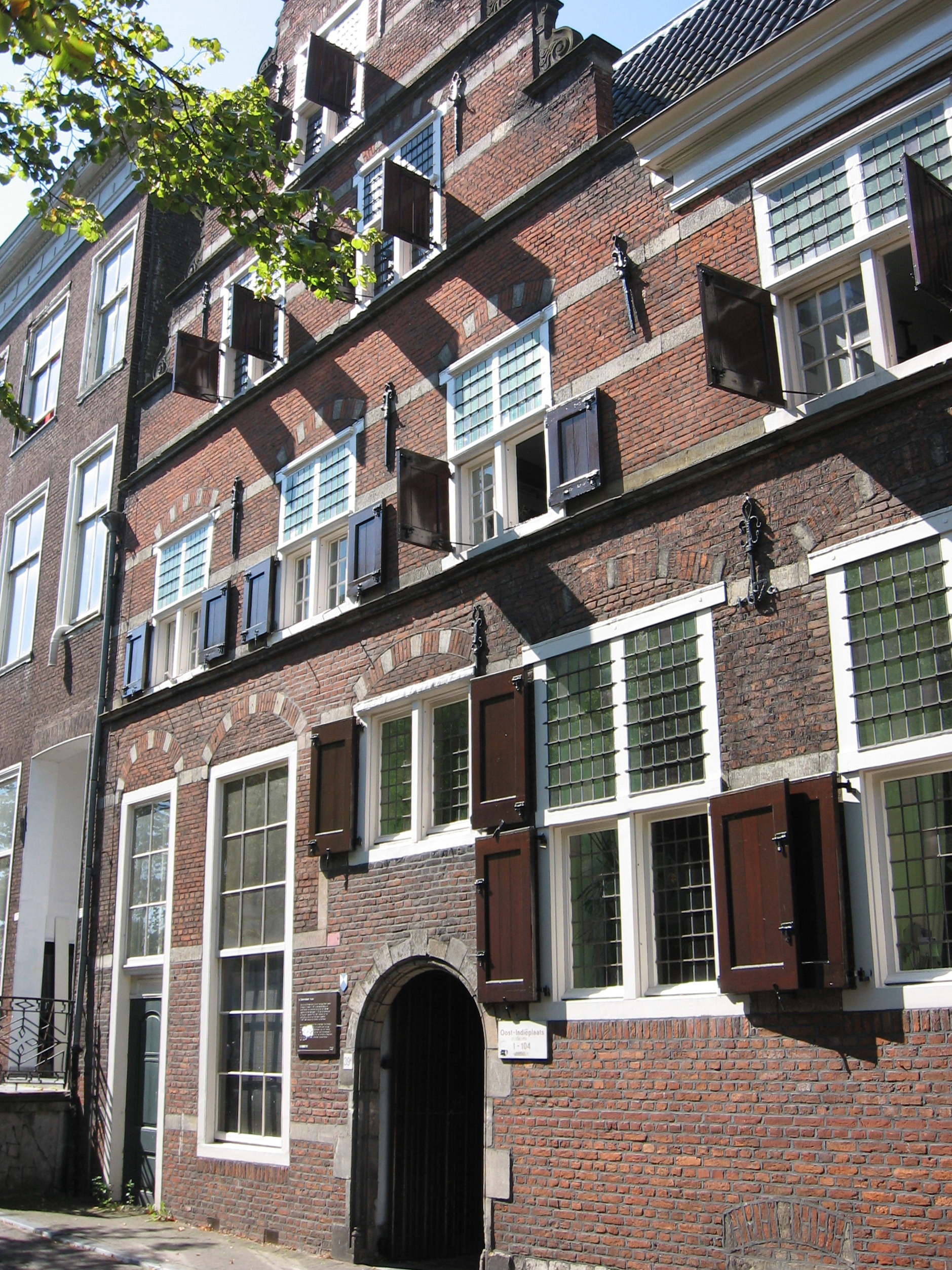 Oude Delft, Oost-Indisch Huis, rijksmonument, Delft